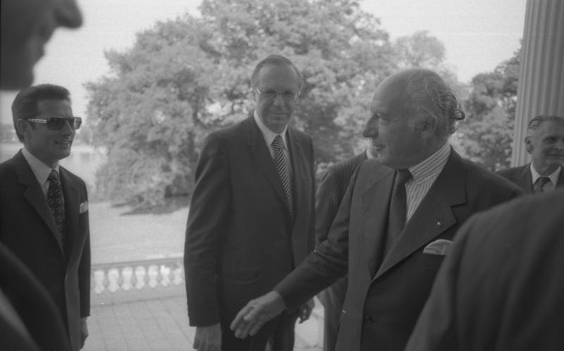 Bundespräsident Walter Scheel empfängt die Teilnehmer der Botschafterkonferenz aus osteuropäischen Staaten im Bundespräsidialamt.